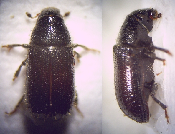 Tomicus piniperda (syn. Blastophagus piniperda) 20fach Imago von rechts und oben